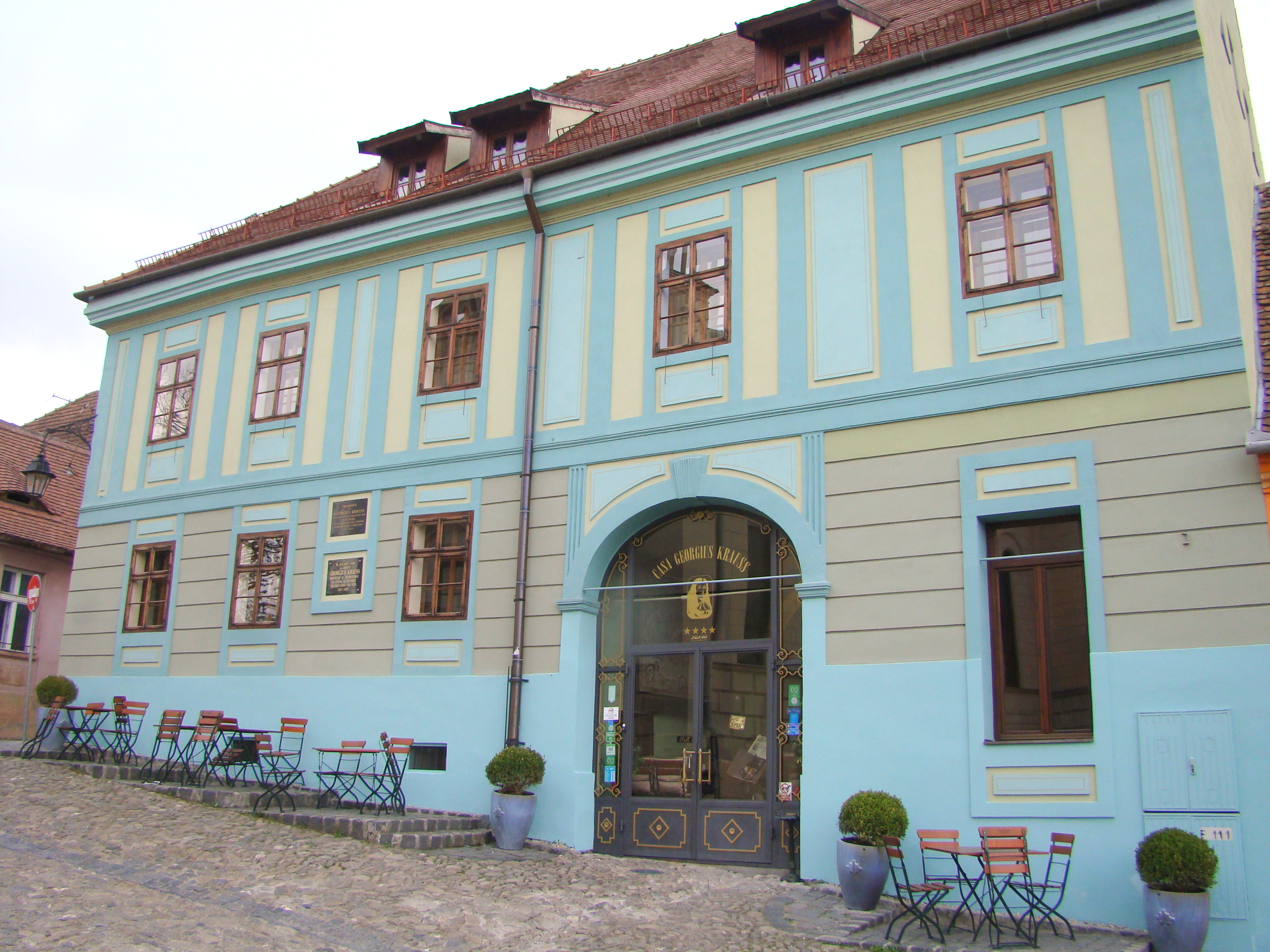 Casă, municipiul Sighișoara, str. Bastionului 11 sec. XVII, înc. sec. XX